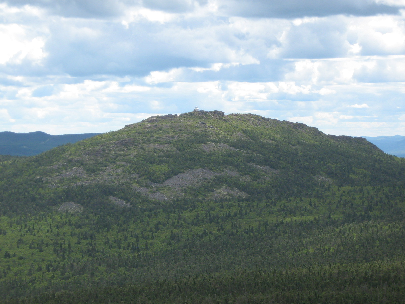 Mont Carleton vue du mont Head